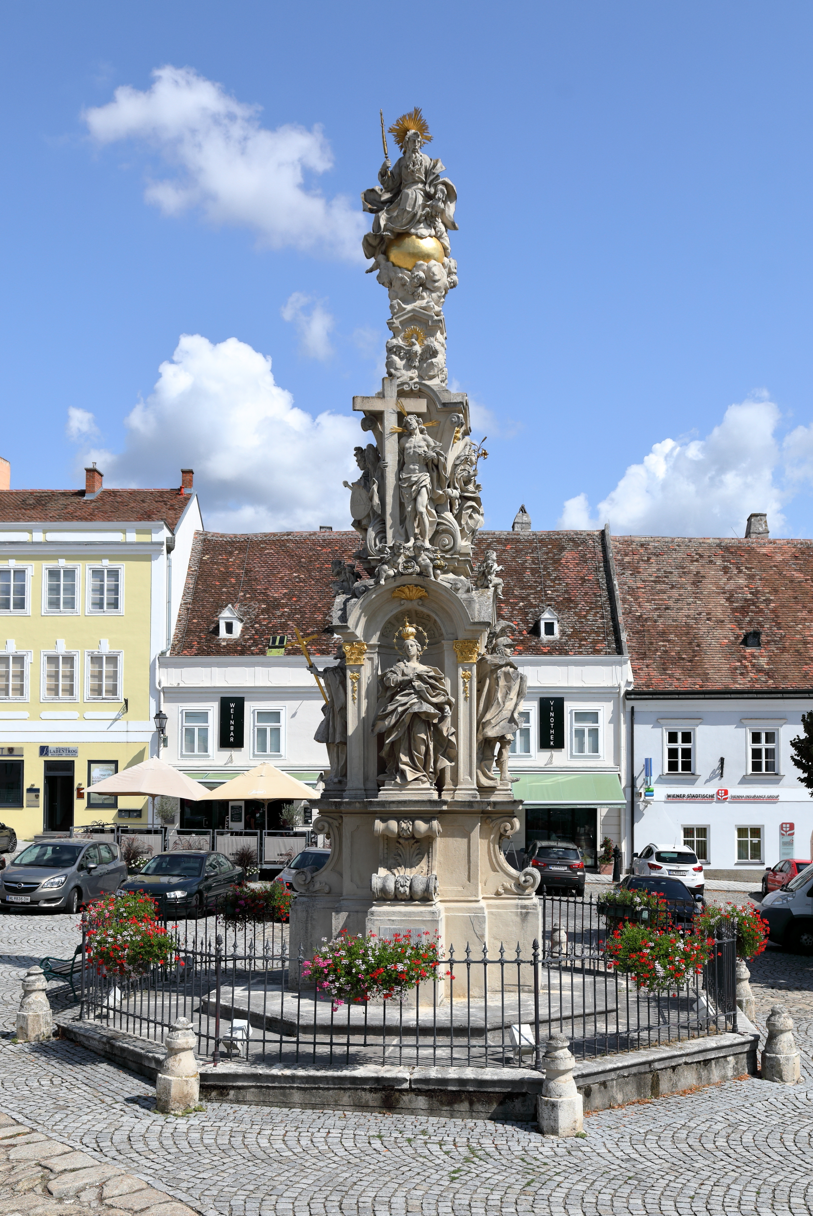 Die Dreifaltigkeitssäule am Hauptplatz in der niederösterreichischen Stadtgemeinde Retz.Die reich gestaltete Säule stammt aus der Mitte des 18. Jahrhunderts. Die Steinmetzarbeiten führte der Eggenburger Ferdinand Steinböck aus und die Statuen schuf der Retzer Bildhauer Philipp Sturm.